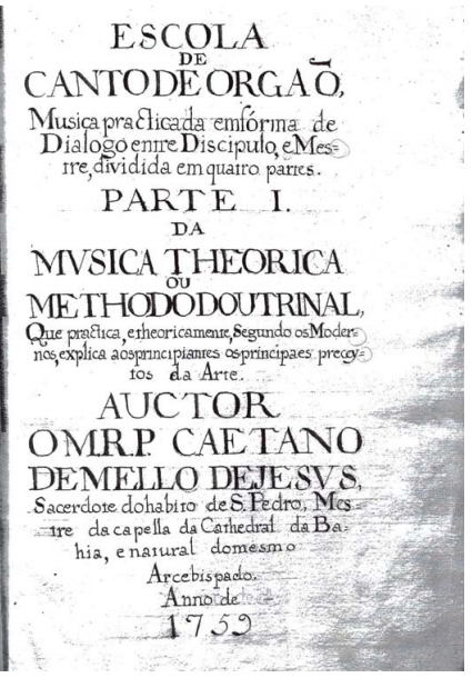 Capa da Escola de Canto de Orgaõ do Padre Caetano de Melo de Jesus